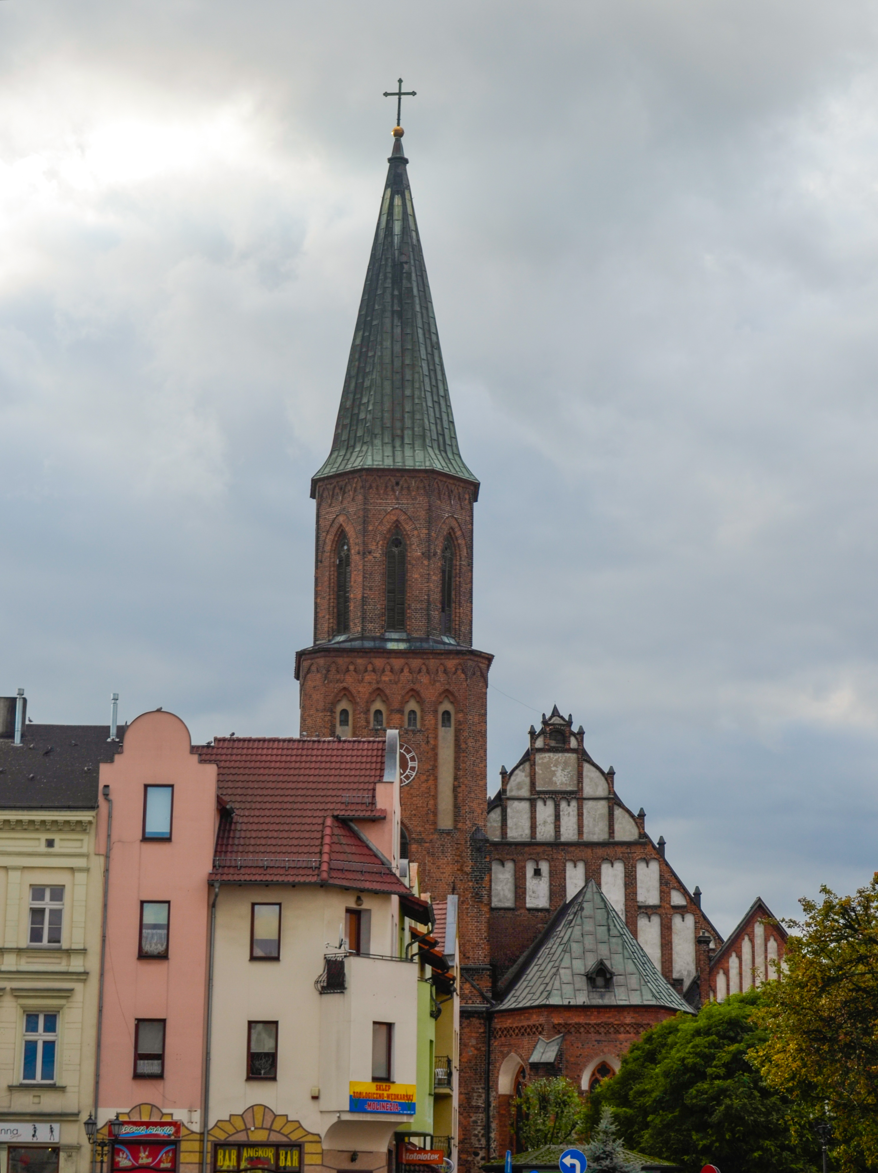 Sulechów, kościół par. p.w. Podwyższenia Krzyża Św., XIV, XVII